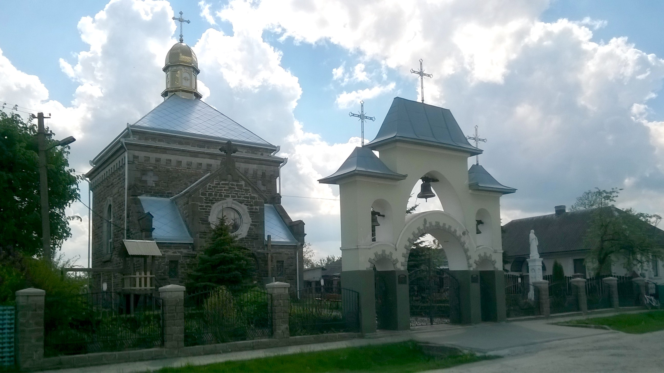 село Серединки, Тернопільська обл. Церква Перенесення мощей св. Миколая. Збудована 1913 р.